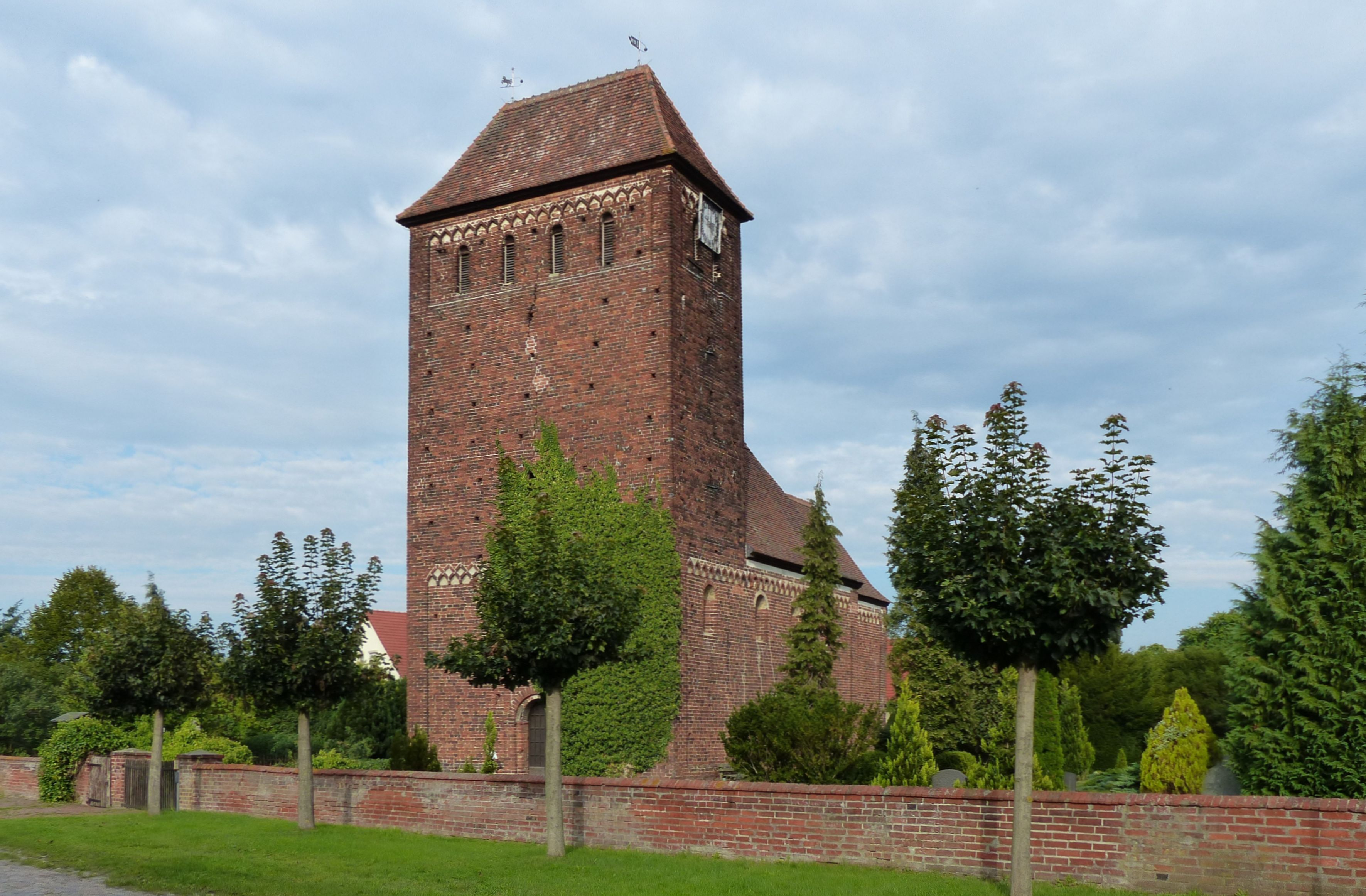 Schiff, Chor und Apsis der um 1200 errichteten spätromanischen Backsteinkirche scheinen sich hinter dem monumentalen Wehrturm hinwegzuducken - so suggeriert es jedenfalls das Bild aus der Perspektive des Fotographen. Ausdruck damals berechtigter Sorge der noch relativ jungen christlichen Gemeinden östlich der Elbe, aus ihren Dörfern wieder vertrieben zu werden. Die Melkower Kirche zeichnet sich durch vollständigen Erhalt der orginalen Bausubstanz aus; sie ist ein Kleinod spätromanischer Backsteinarchitektur in Sachsen-Anhalt.